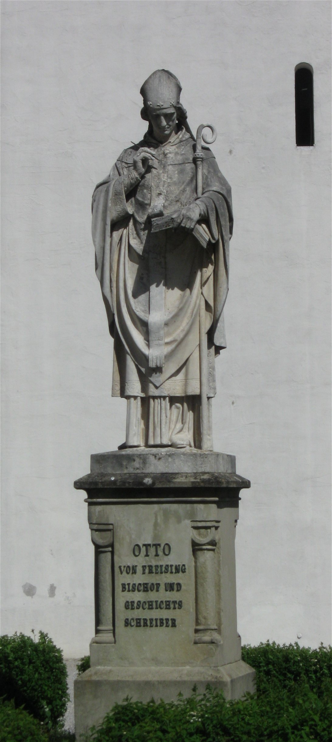 Domberg; Denkmal für den Bischof und Geschichtsschreiber Otto von Freising, lebensgroße Vollplastik auf romanisierendem Postament, von Caspar von Zumbusch, 1858.